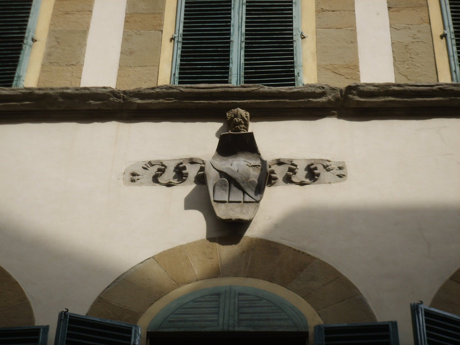 Casa velluti stemma ridolfi